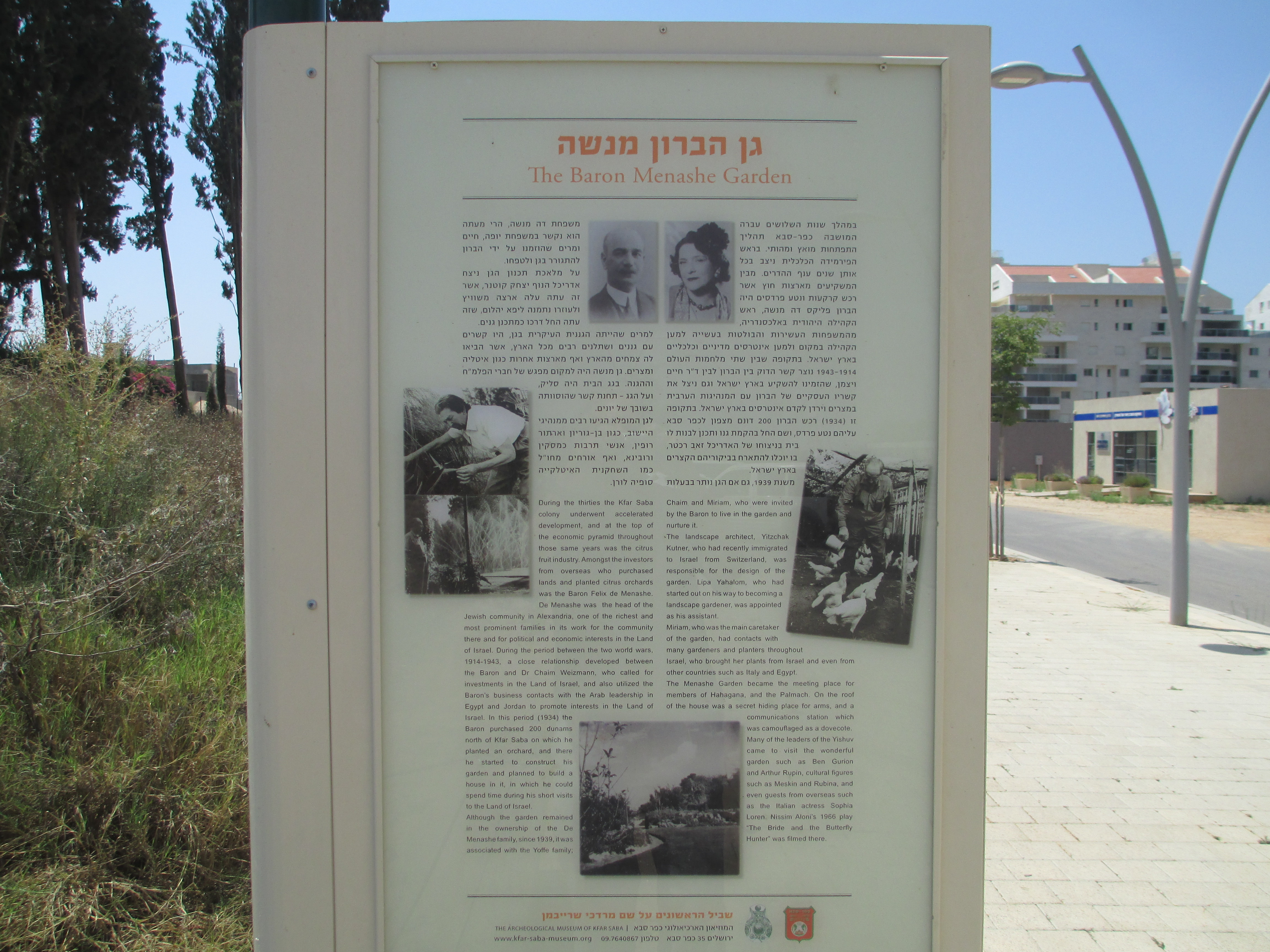 שלט הסבר על גן מנשה ברחוב אנגל בכפר סבא